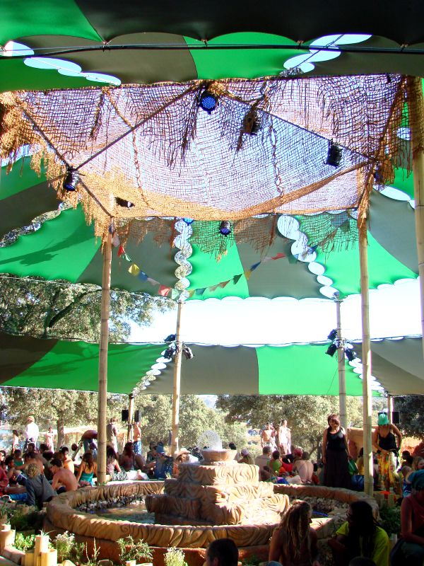 Boom Festival 2008